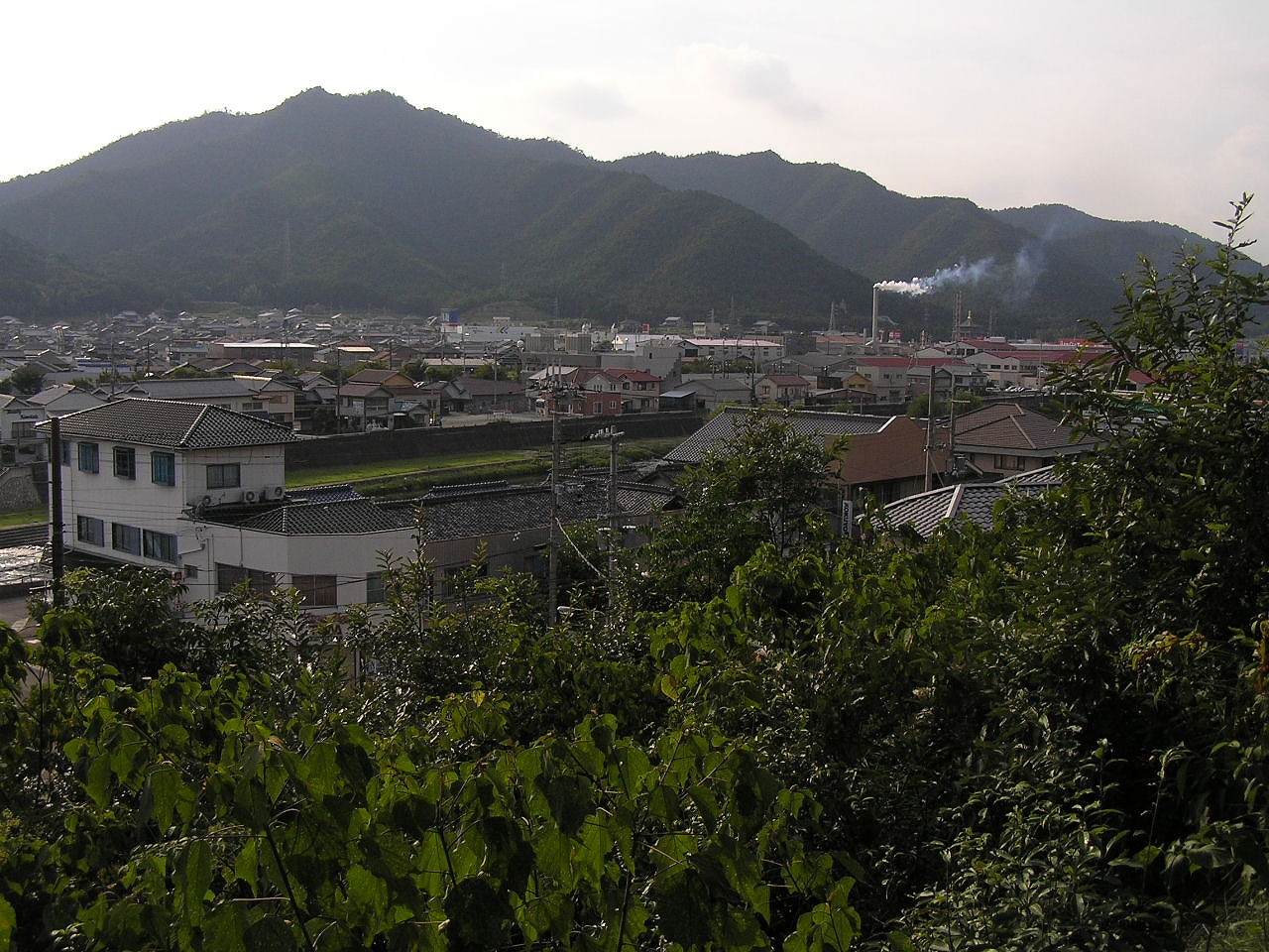 西脇市俯瞰